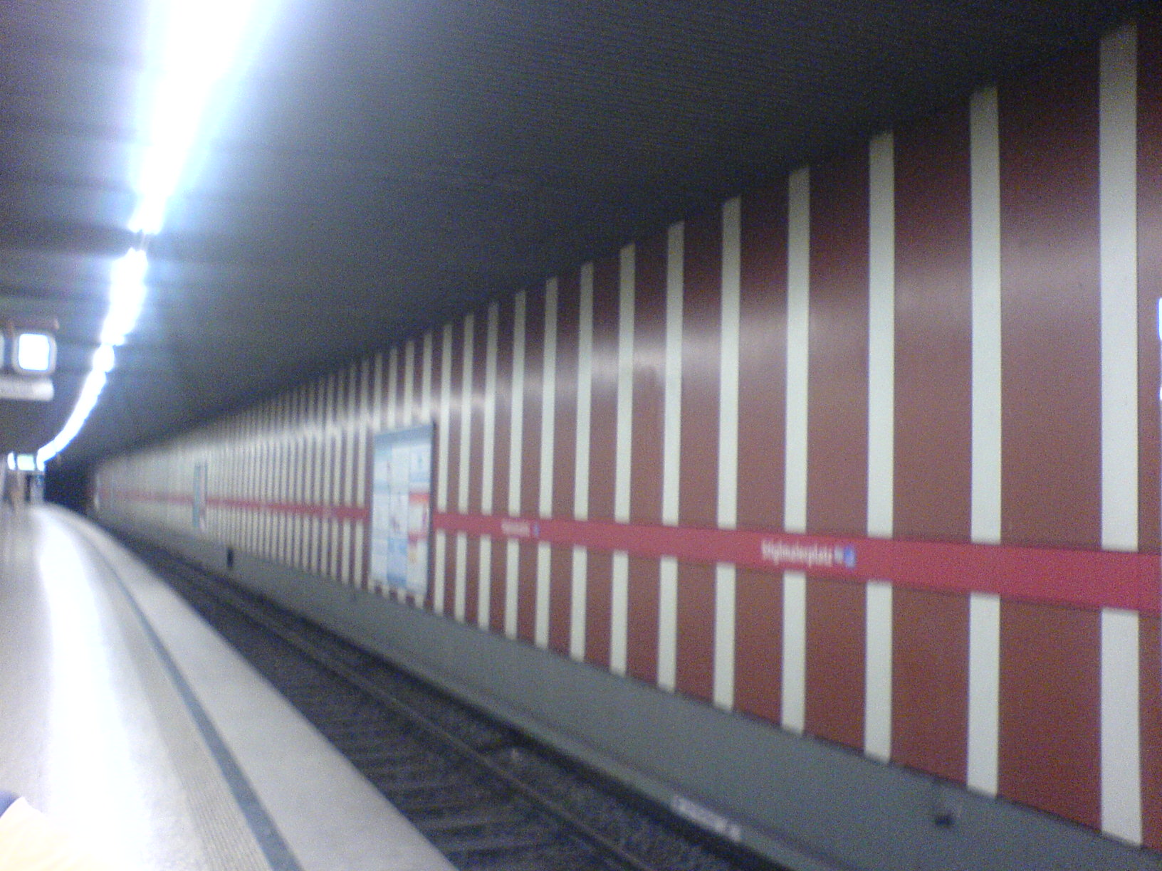 U-Bahnhof Stiglmaierplatz (München), Bahnsteigwand